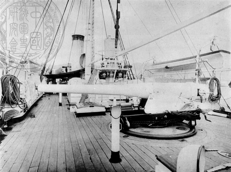 Фото кормового орудия канонерки "Сайен"